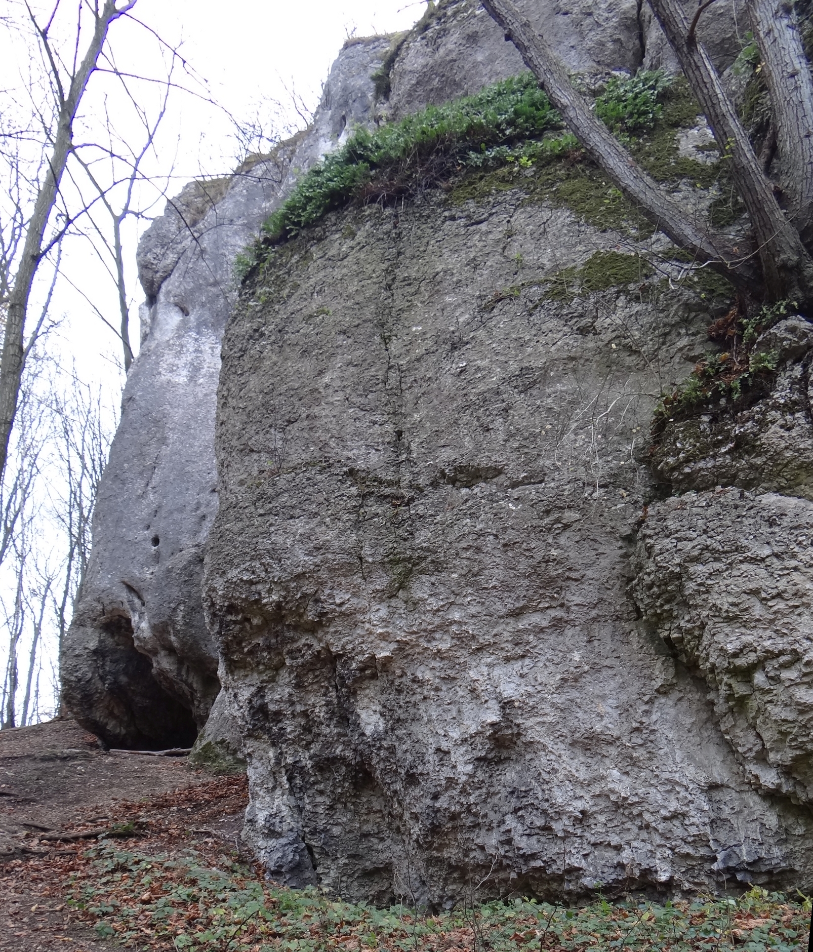 Grupa Wroniej Baszty w Dolinie Kobylańskiej